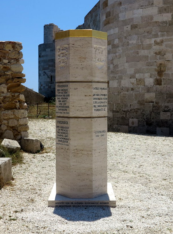 Stauferstele in Siracusa von Markus Wolf (2018 eingeweiht)